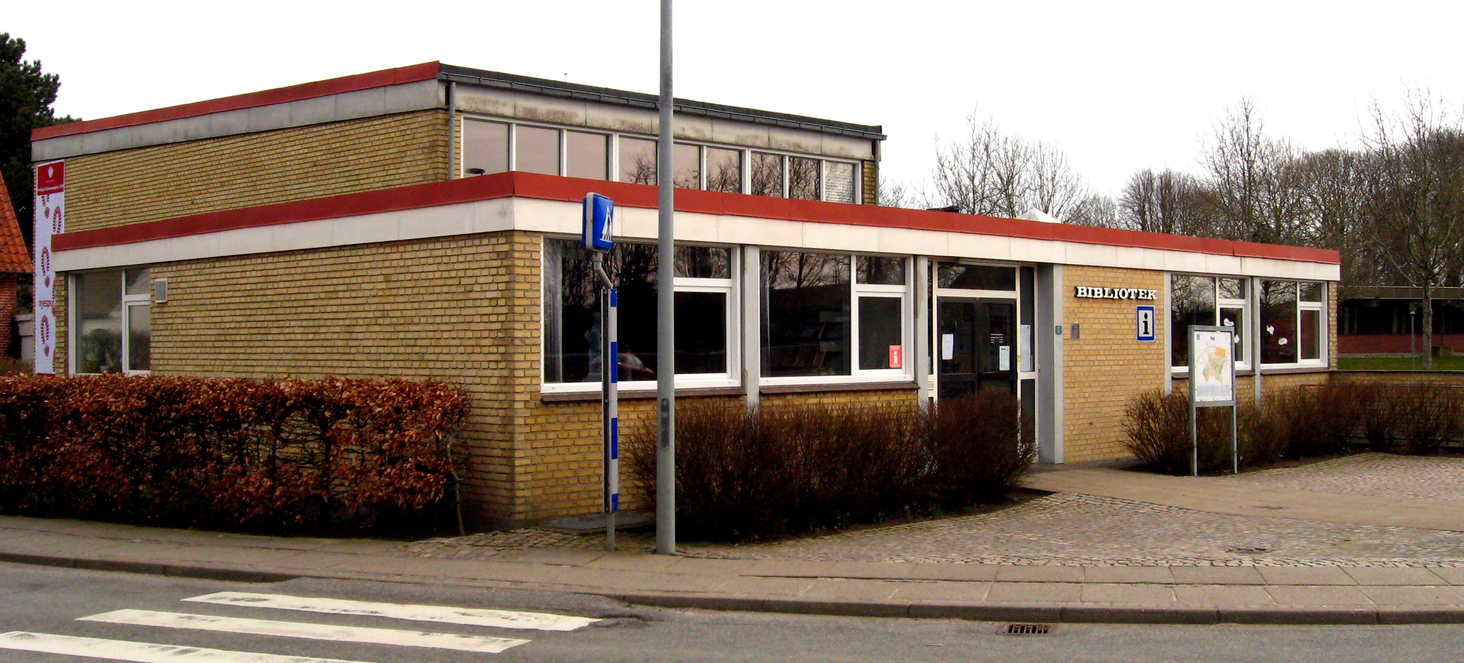 Vrå Bibliotek, Hjørring Kommune